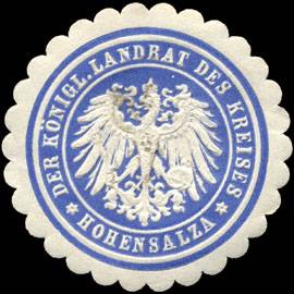 Sealing stamp Title: Der Königliche - Landrat des Kreises Hohensalza Description: blau, weiß, geprägt Place: Hohensalza size: 4 cm